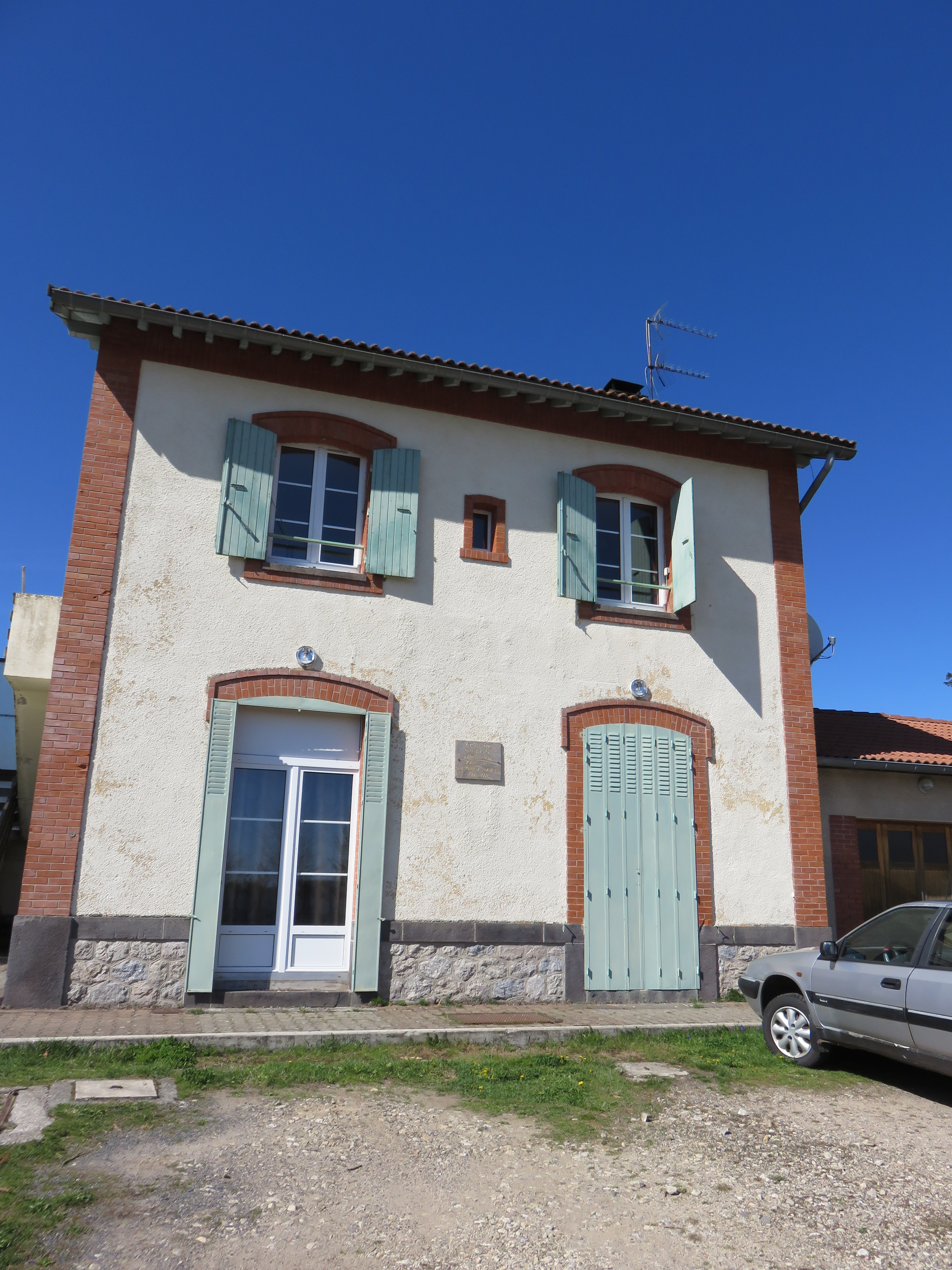 Ancienne gare de Jullianges, dans la Haute-Loire.